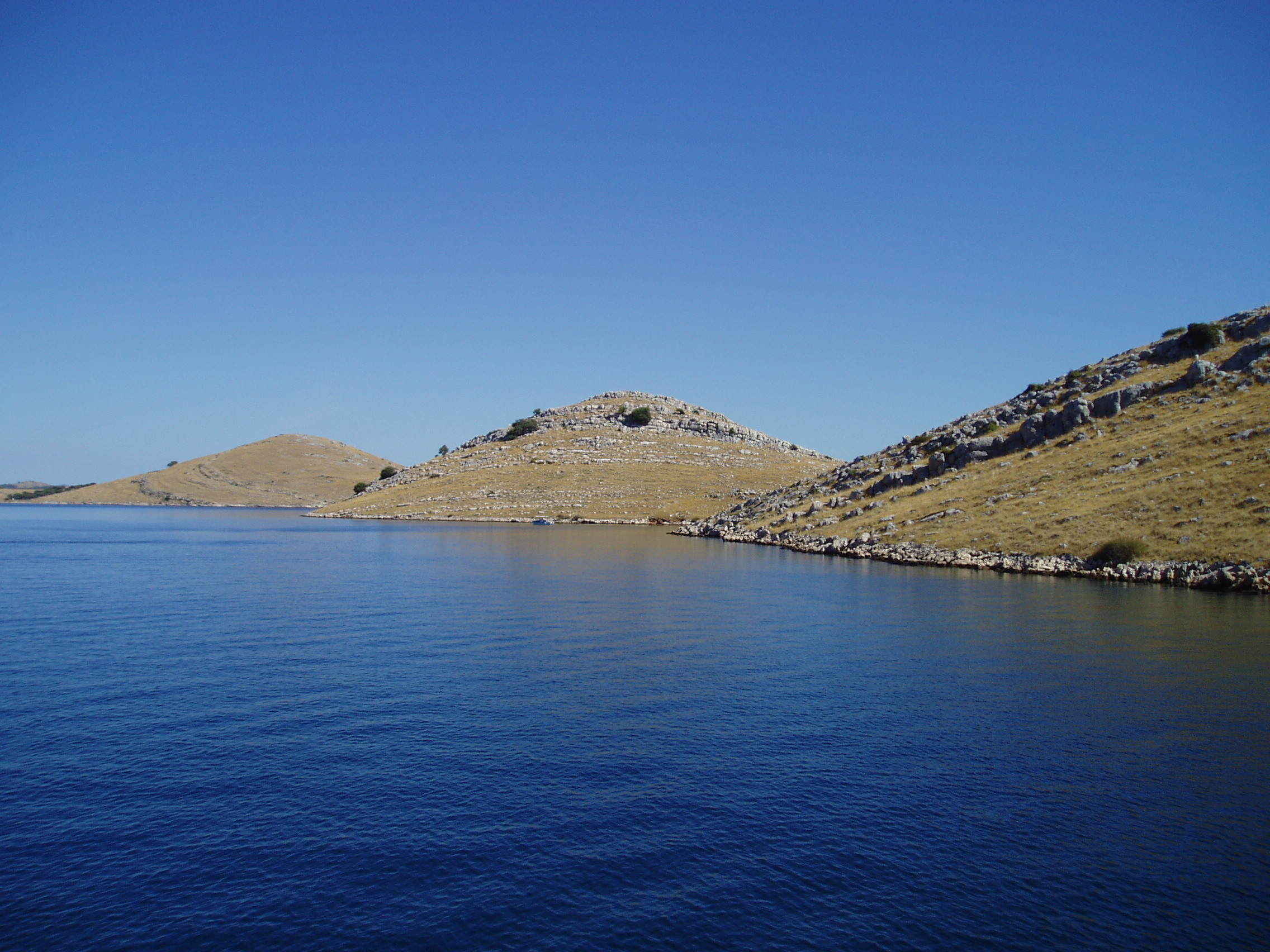 Kornati